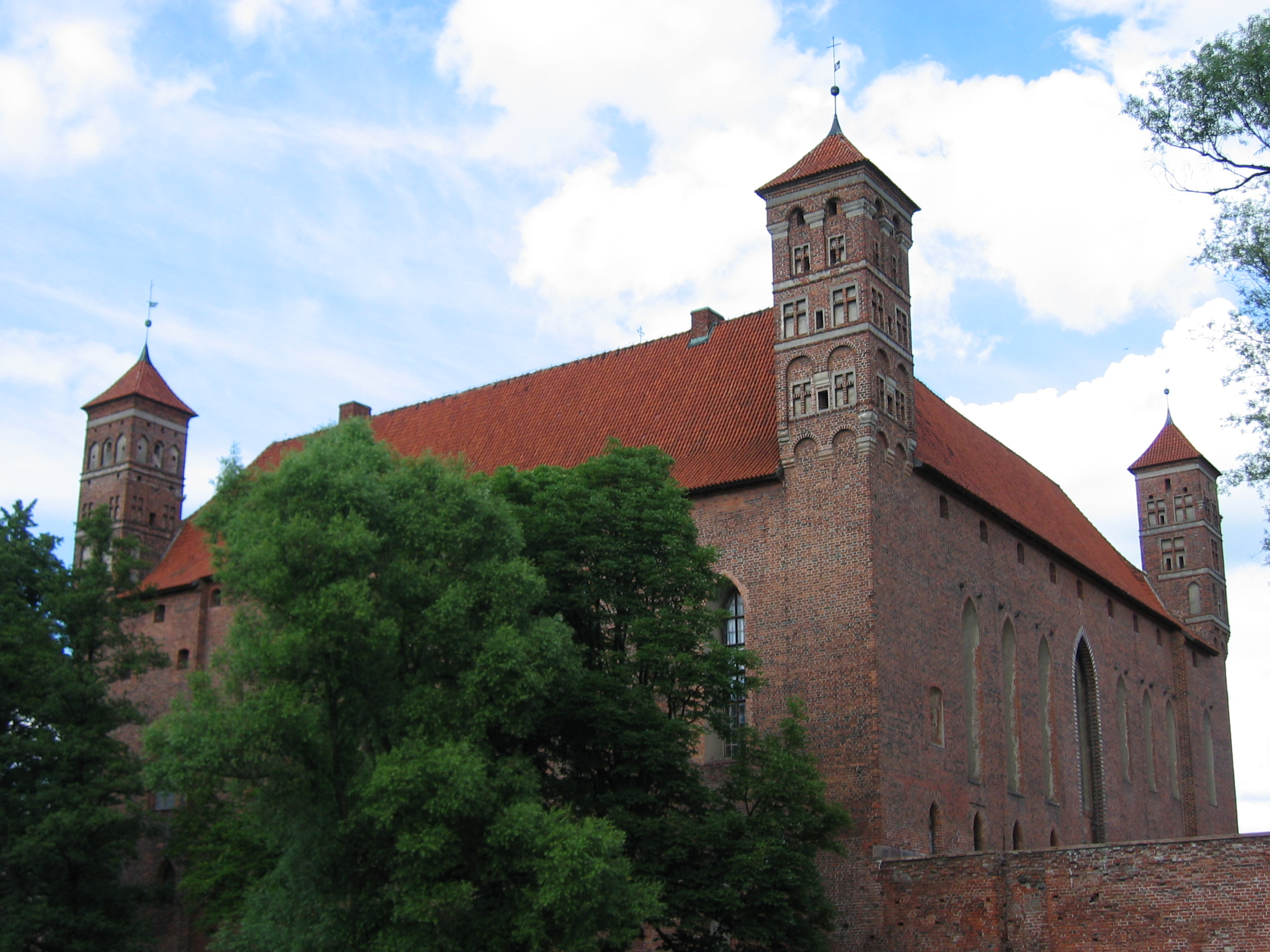 Lidzbark Warmiński 0795